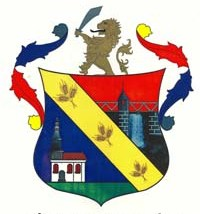 Coat of arms of Sânmihaiu Român, Romania